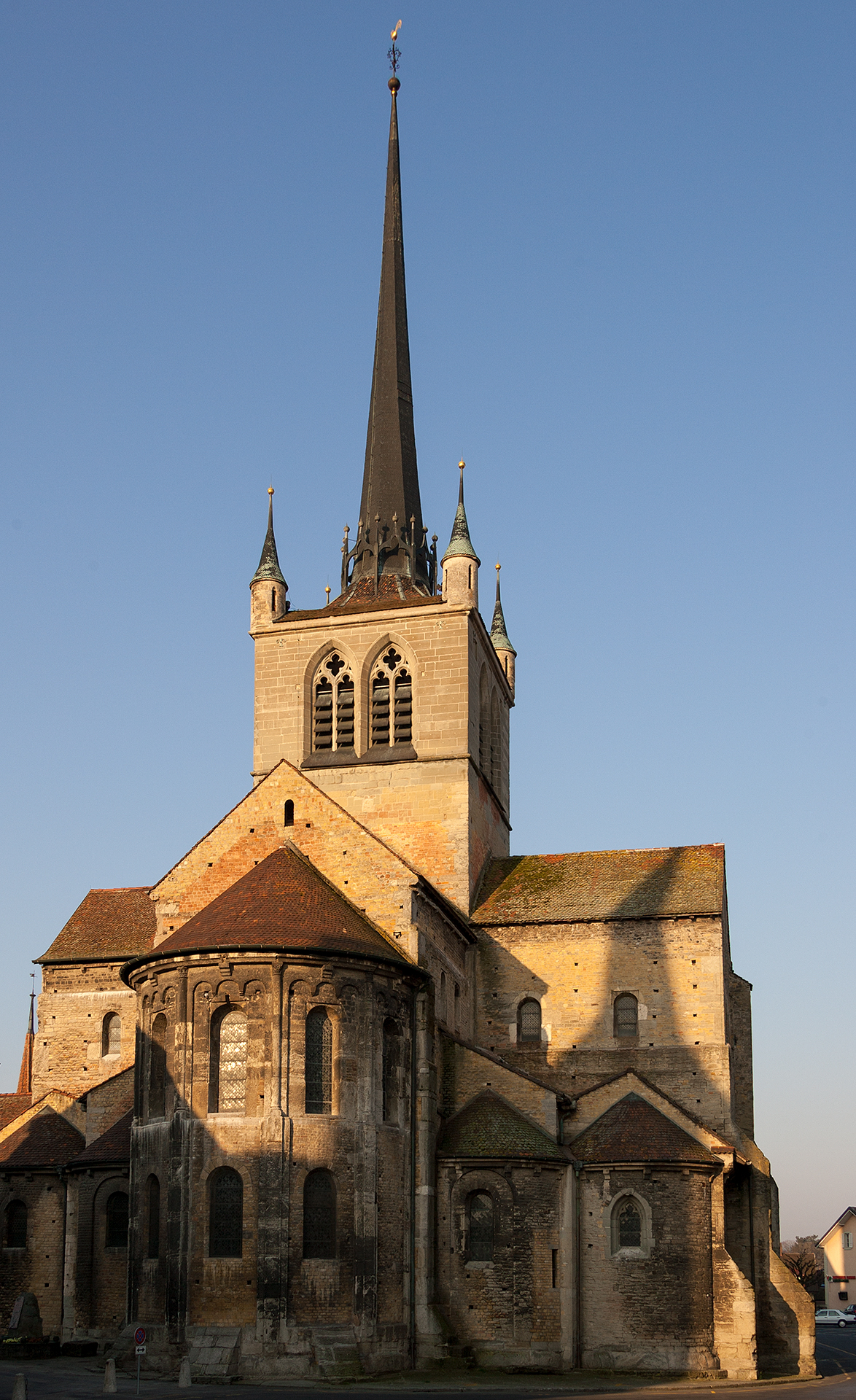 Abbatiale in Payerne (VD)